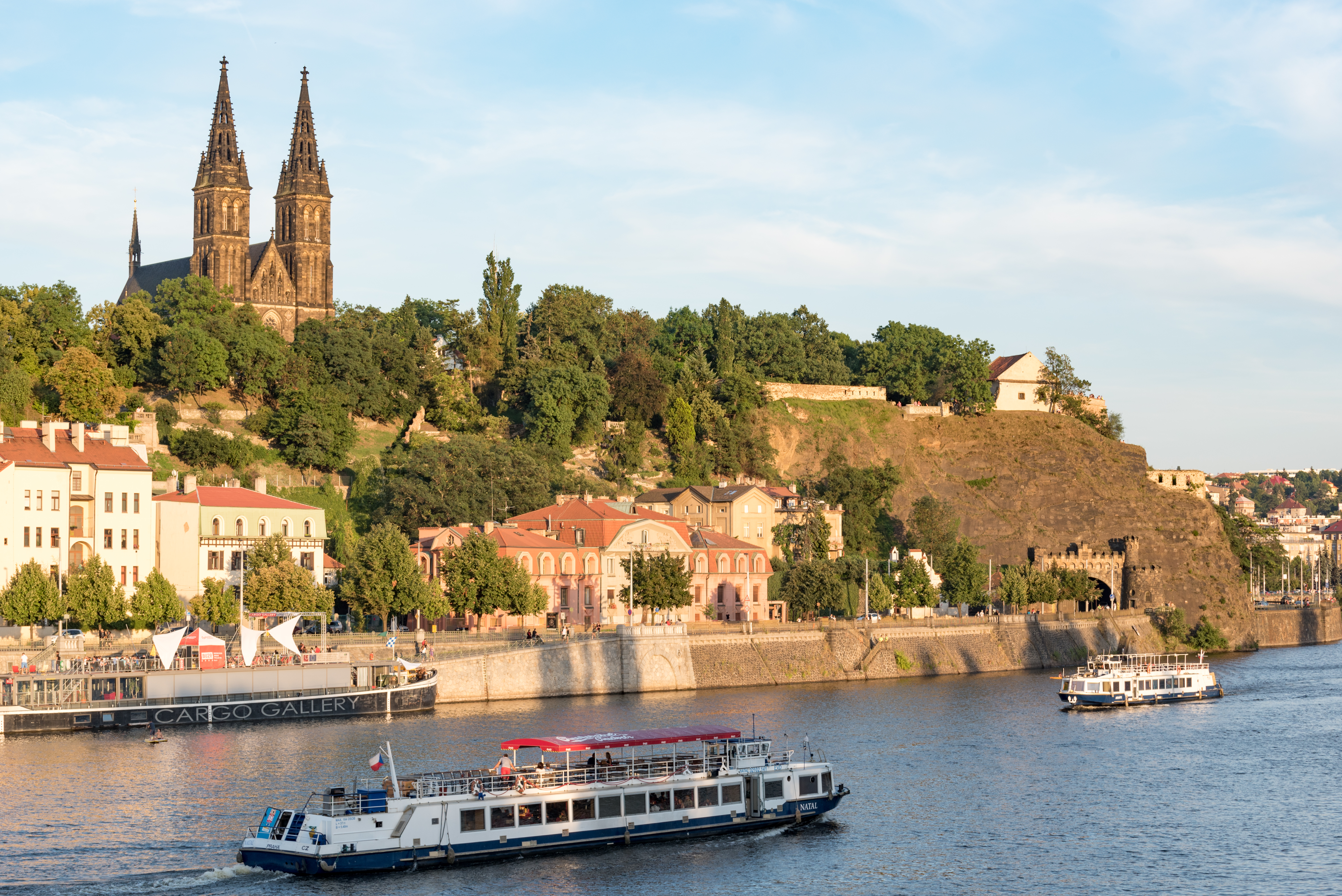 Praha 2, Pevnost Vyšehrad